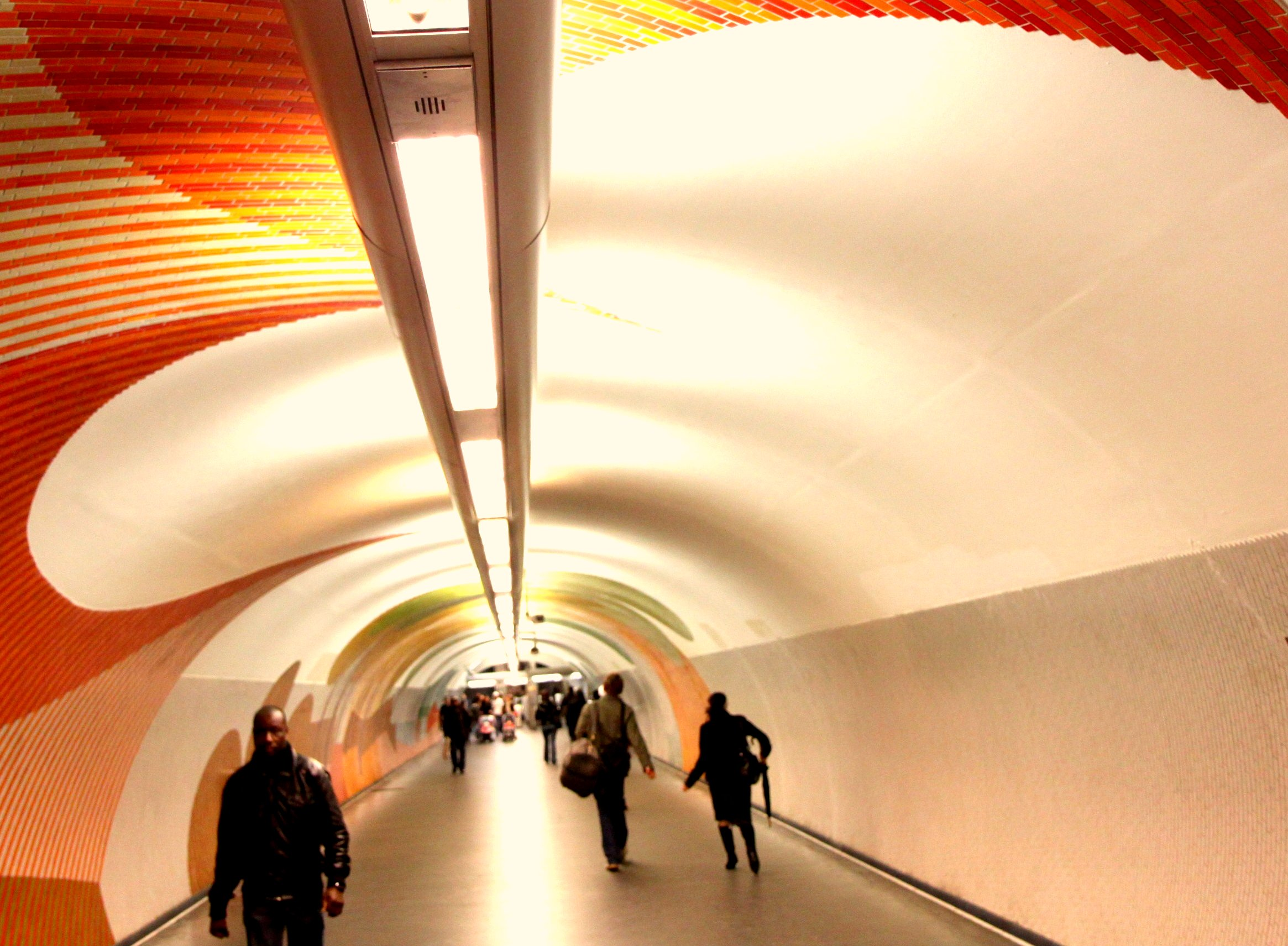 Couloir de correspondance entre la gare de Paris-Nord et la station de métro La Chapelle, à Paris (10e arrondissement)